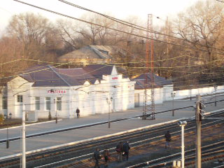 Станція "Авдіївка" Донецької залізниці, Україна